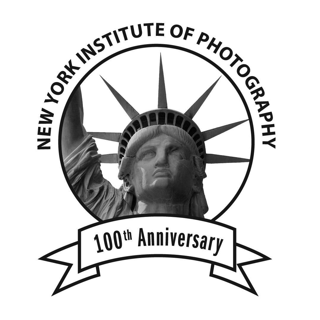 Logotipo aniversario de 100 años del NYIP